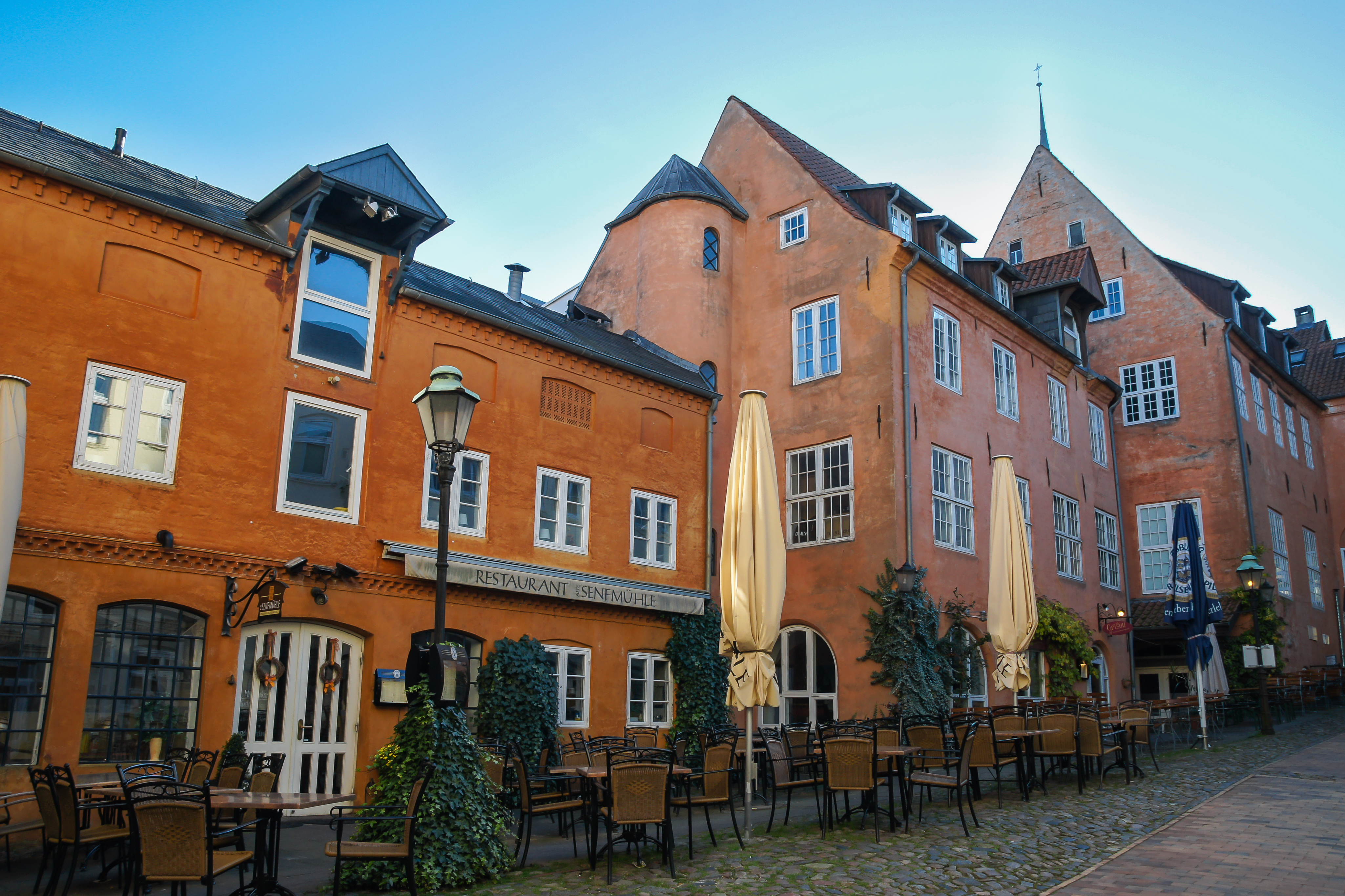 Flensburg-Altstadt, Holm 45, Seitenfluegel, Denkmal-Nr. 46.3/4